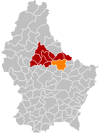 Localisatiounskaart vun der Gemeng Ärenzdall